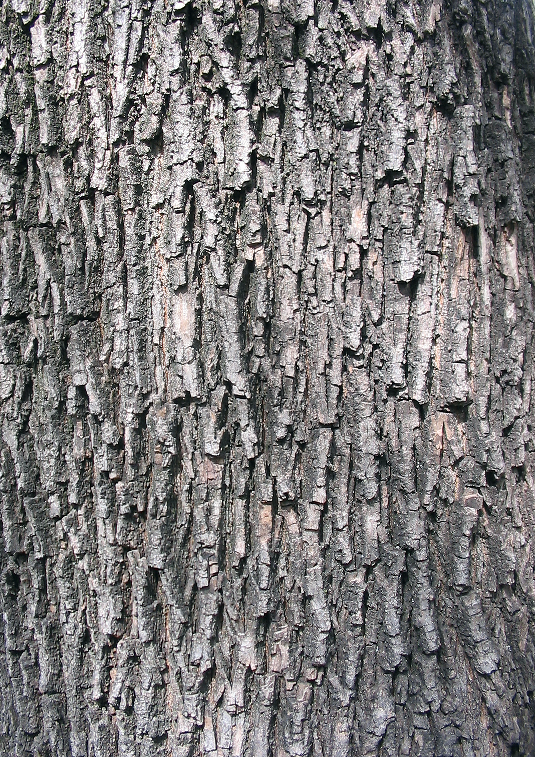 Fotografía de la textura del tronco del Acer campestre de las aceraceae, habita en Europa y oeste de Asia, en Español Arce común. La fotografía está realizada en el Real Jardín Botánico de Madrid. España. El 4 de Abril de 2007.